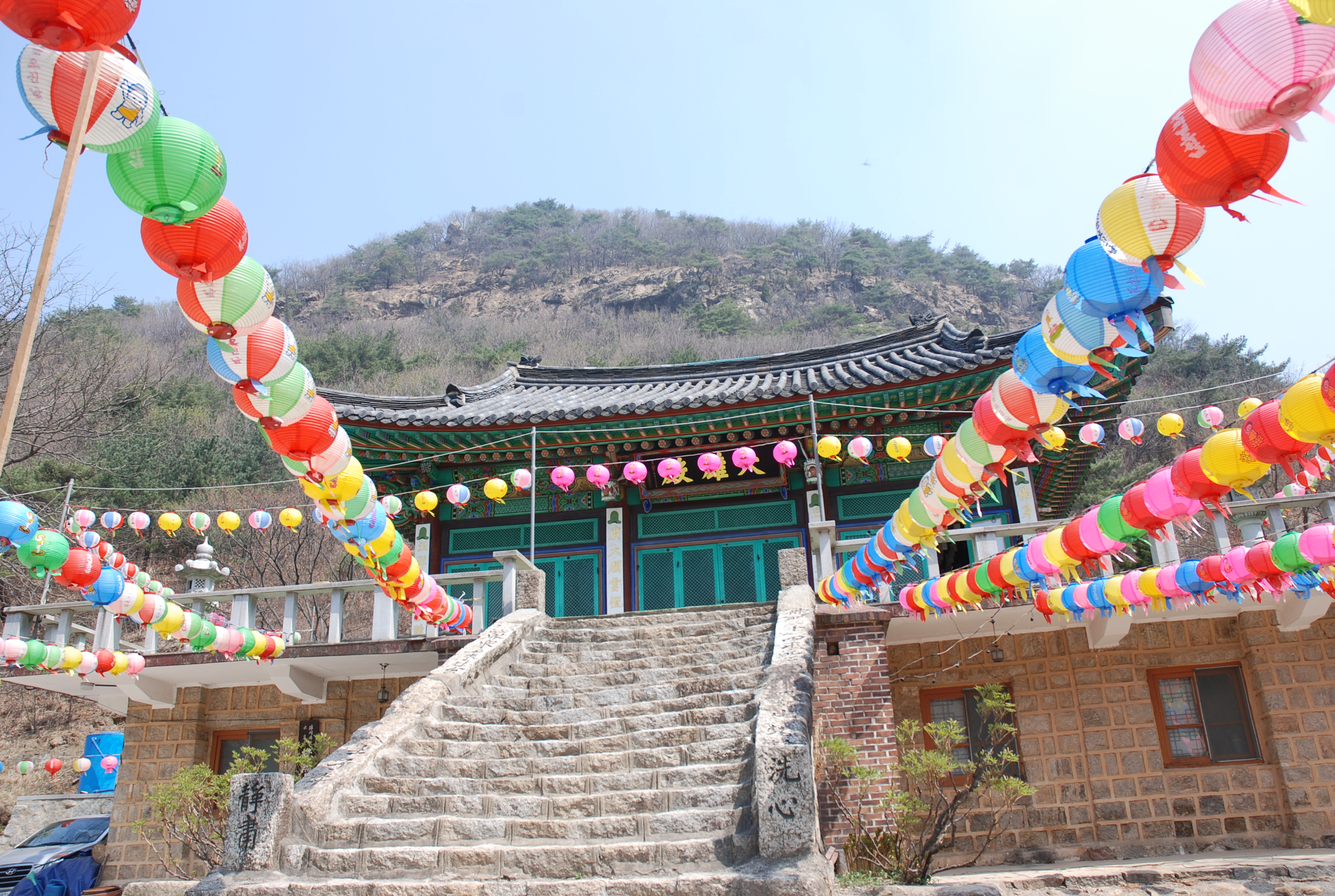 감악산 범륜사